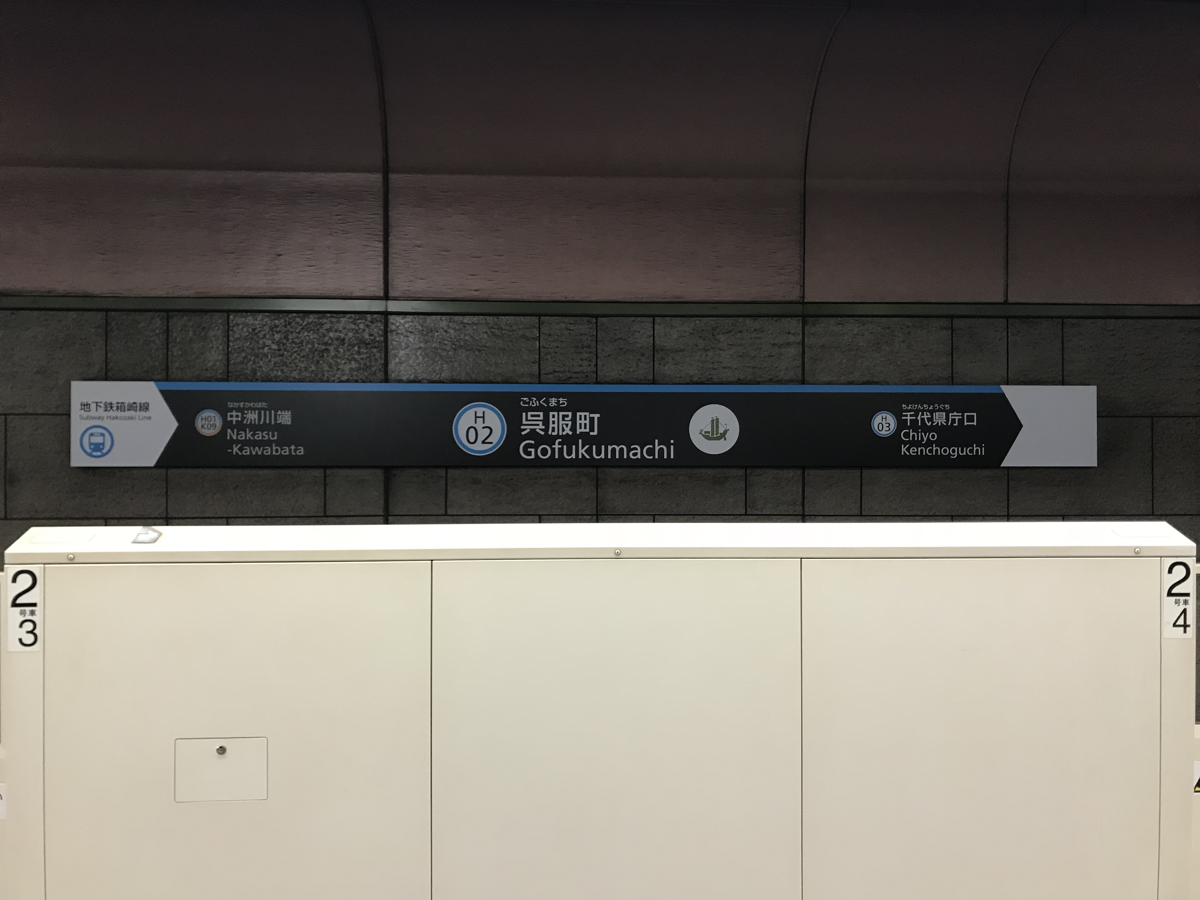 呉服町駅の駅名標。イラストは唐人舟